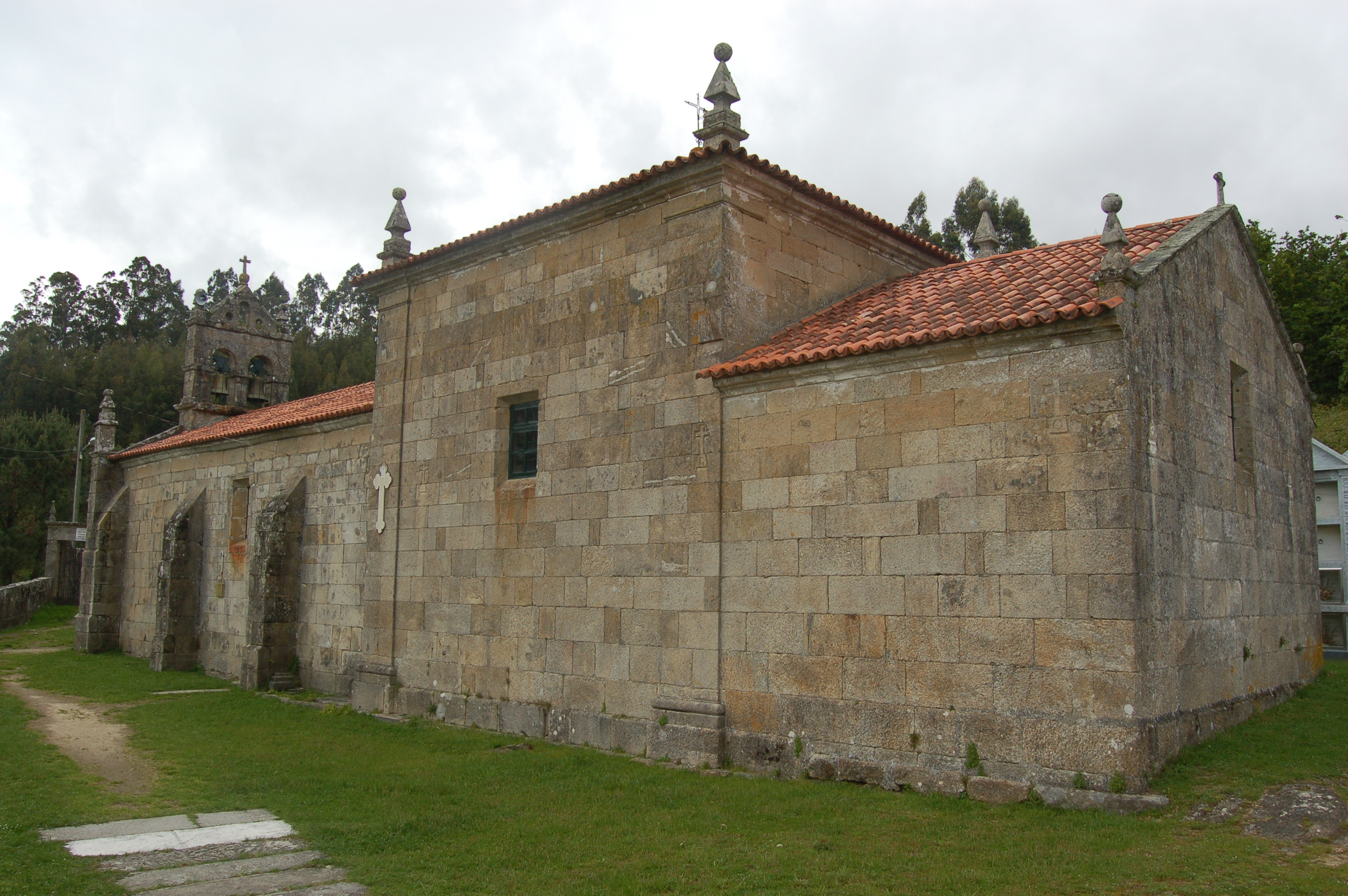 Igrexa parroquial de San Pedro de Bordóns (Sanxenxo)